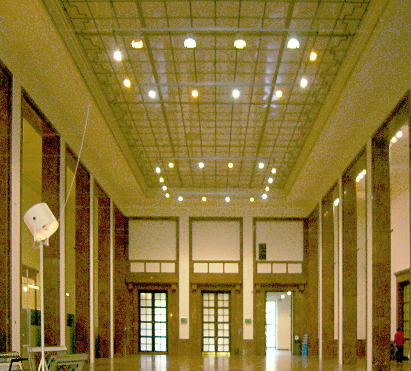 Haus der Kunst, München - Mittelhalle.